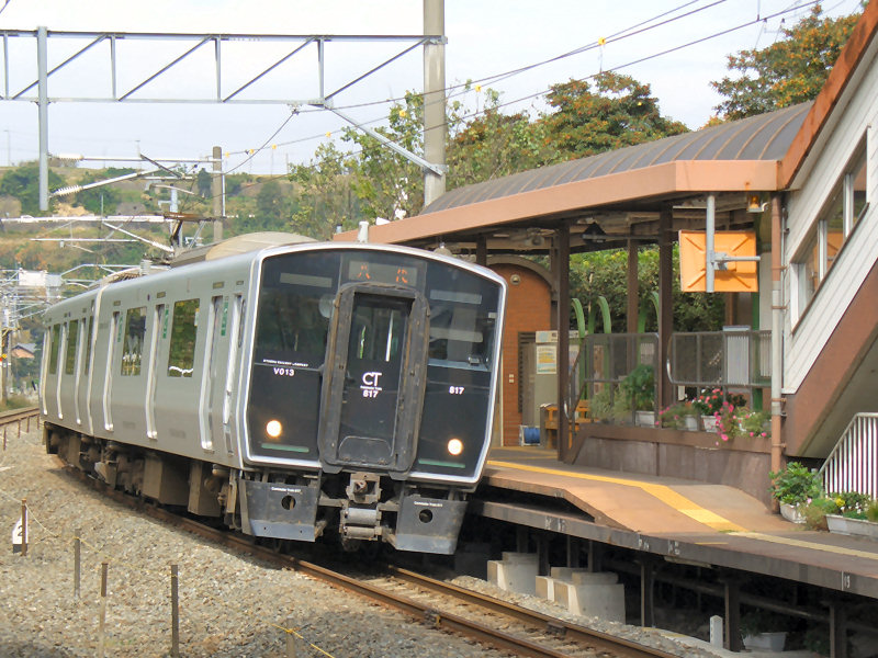 JR鹿児島本線崇城大学前駅 急カーブのために傾いて停車する電車 写真手前が熊本駅方面。 撮影者/著者/著作権保有者 : MK Products (本人がアップロード) 撮影日 : 2007/11/04 崇城大学前駅用にアップロードした画像です。良い画像があれば別の画像に変えてください。